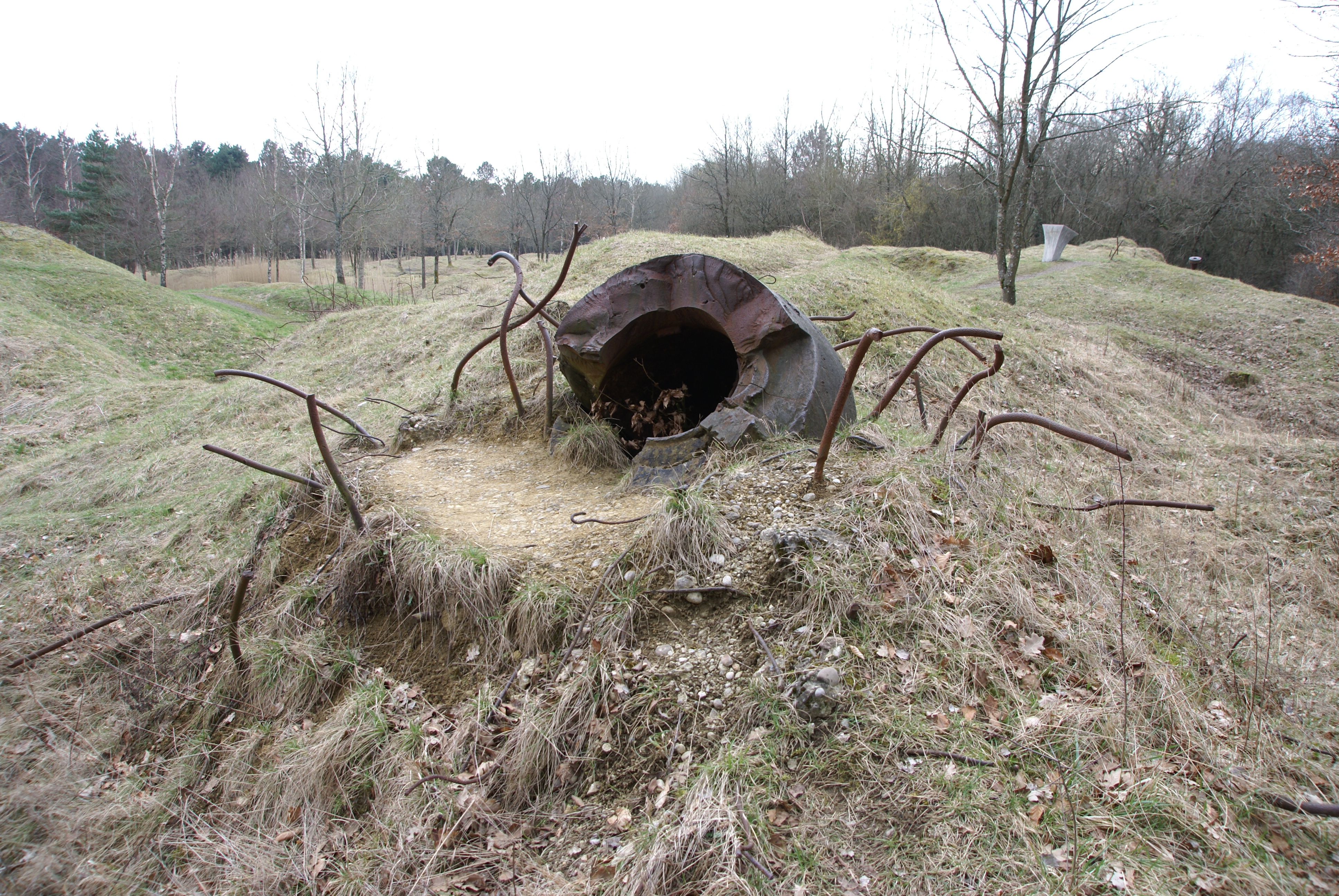 Restes déchiquetés de l'observatoire cuirassé de l'ouvrage de Thiaumont, près de Verdun.